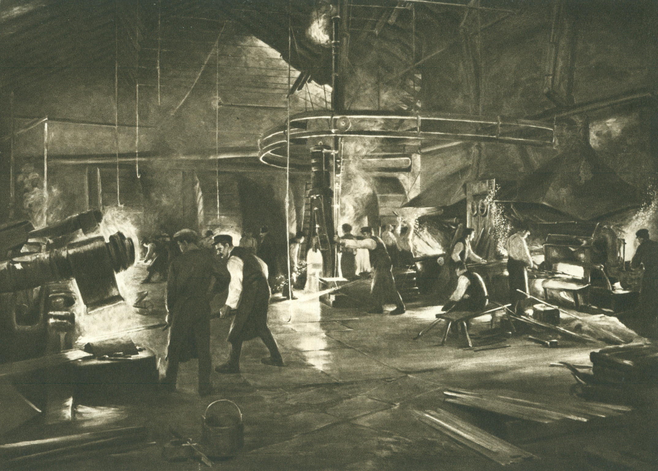 Walloon forge at Leufsta iron works in Sweden 1912.